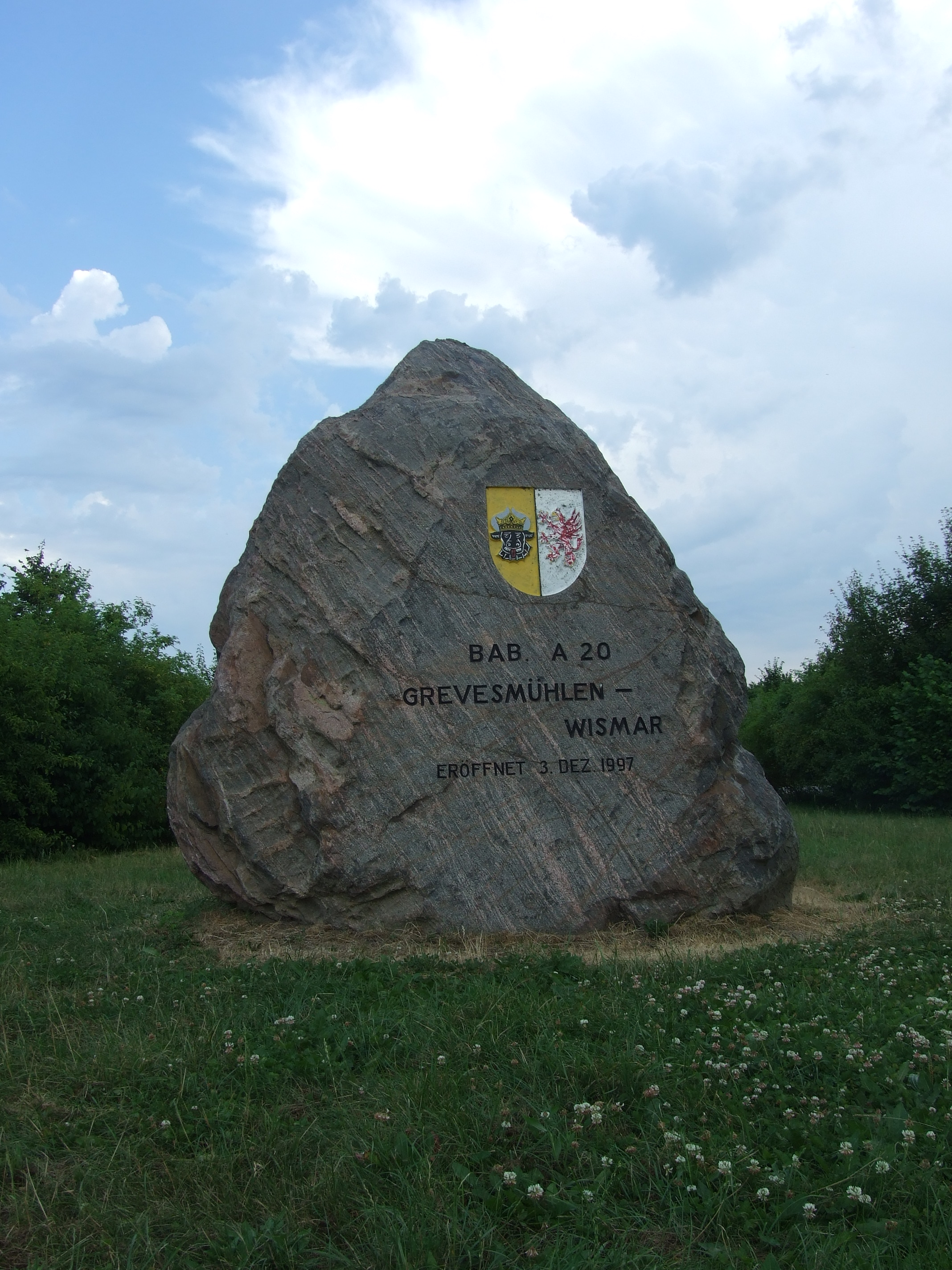 Gedenkstein zur Öffnung des ersten Teilstücks der A 20